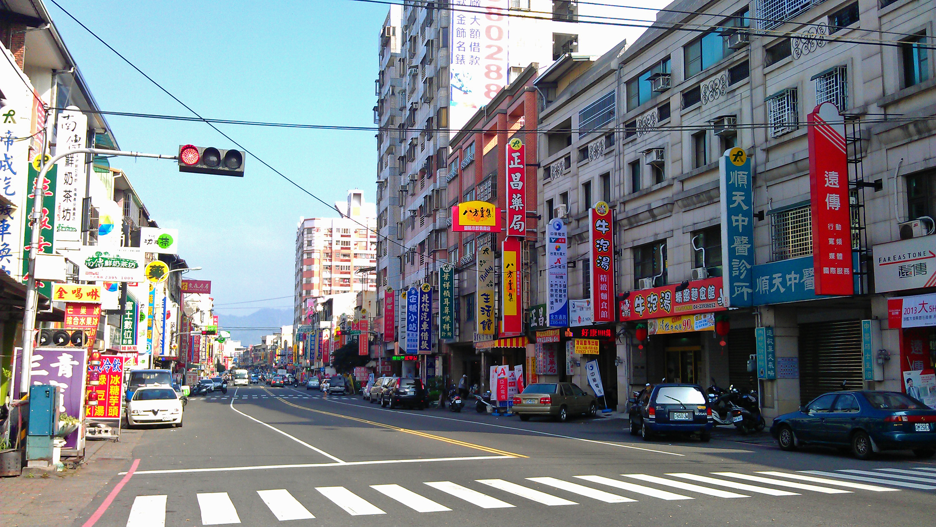 中文（台灣）: 太平區中山路